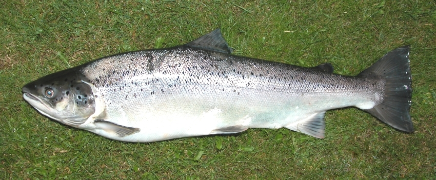 Das Bild zeigt eine Meerforelle, die 2005 aus der Stör in Schleswig-Holstein mit der Handangel gefangen werden konnte. Es handelt sich hier um ein weibliches Tier, einen Rogner, der bei einer Länge von 80+cm ein Gewicht von 6kg+ hatte. Der Fisch befindet sich noch nicht im "Laichkleid", daher ist er silbern, wie zuvor während der Zeit in der Nordsee oder dem Atlantik, wo er sich vermutlich aufgehalten haben dürfte. Fische dieser Gattung, die schon etwas länger im Fluss verweilt haben, sehen dann ein wenig anders aus, sind manchmal zu verwechseln mit Bachforellen. Die Farbe des Körpers wechselt dann von Silber zu Braun. Copyright by: Wolfgang Striewski